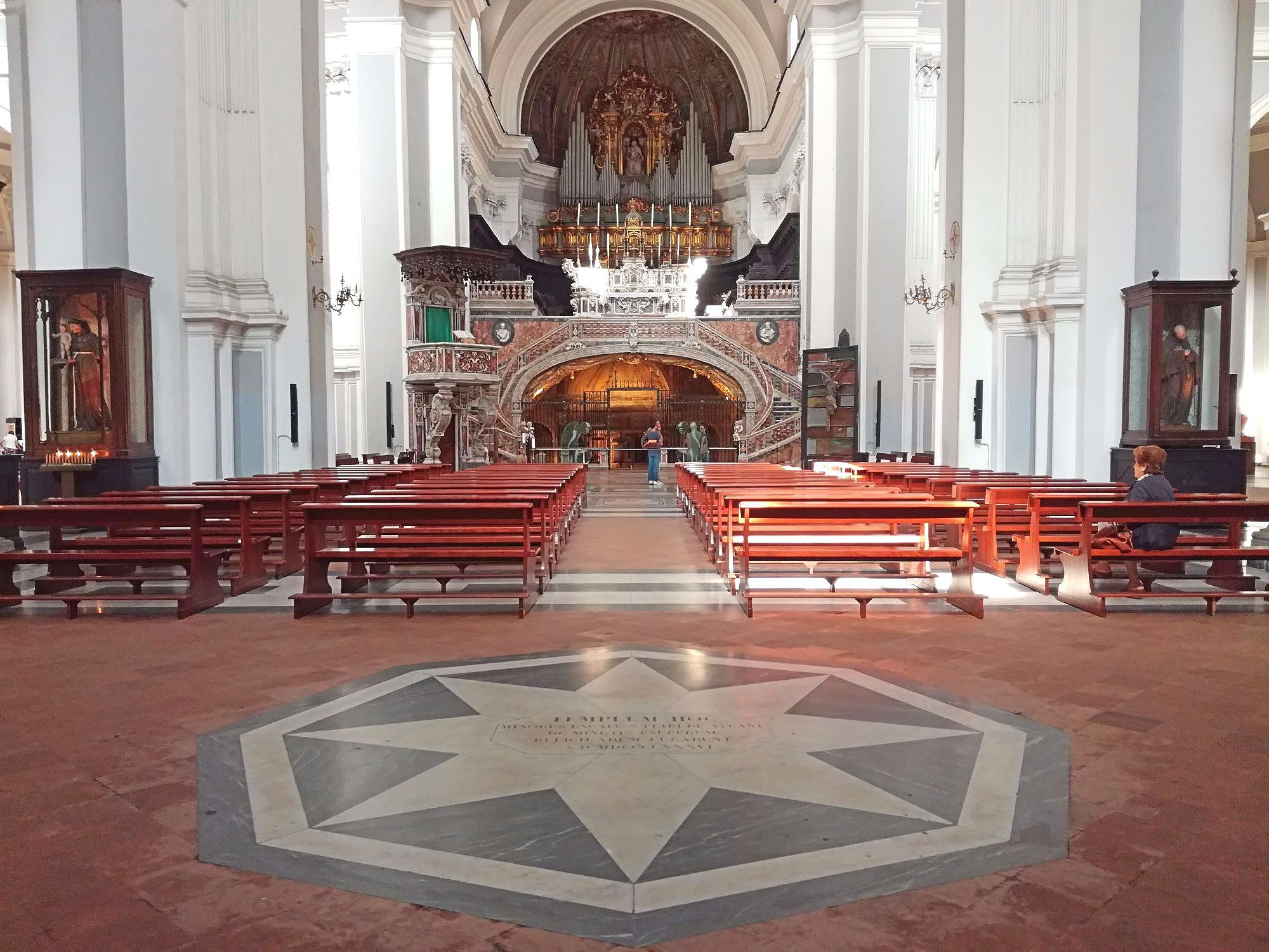 Basilica di Santa Maria della Sanità, L'altare maggiore